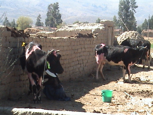 Ganaderia Familiar (Area Rural)